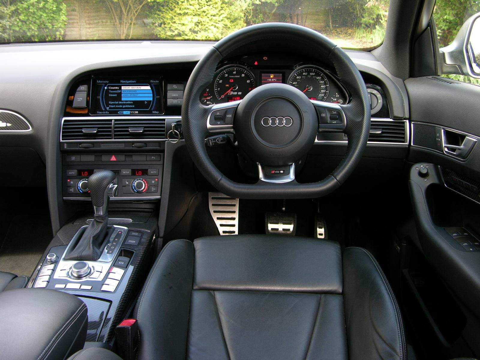 2008 Audi RS6